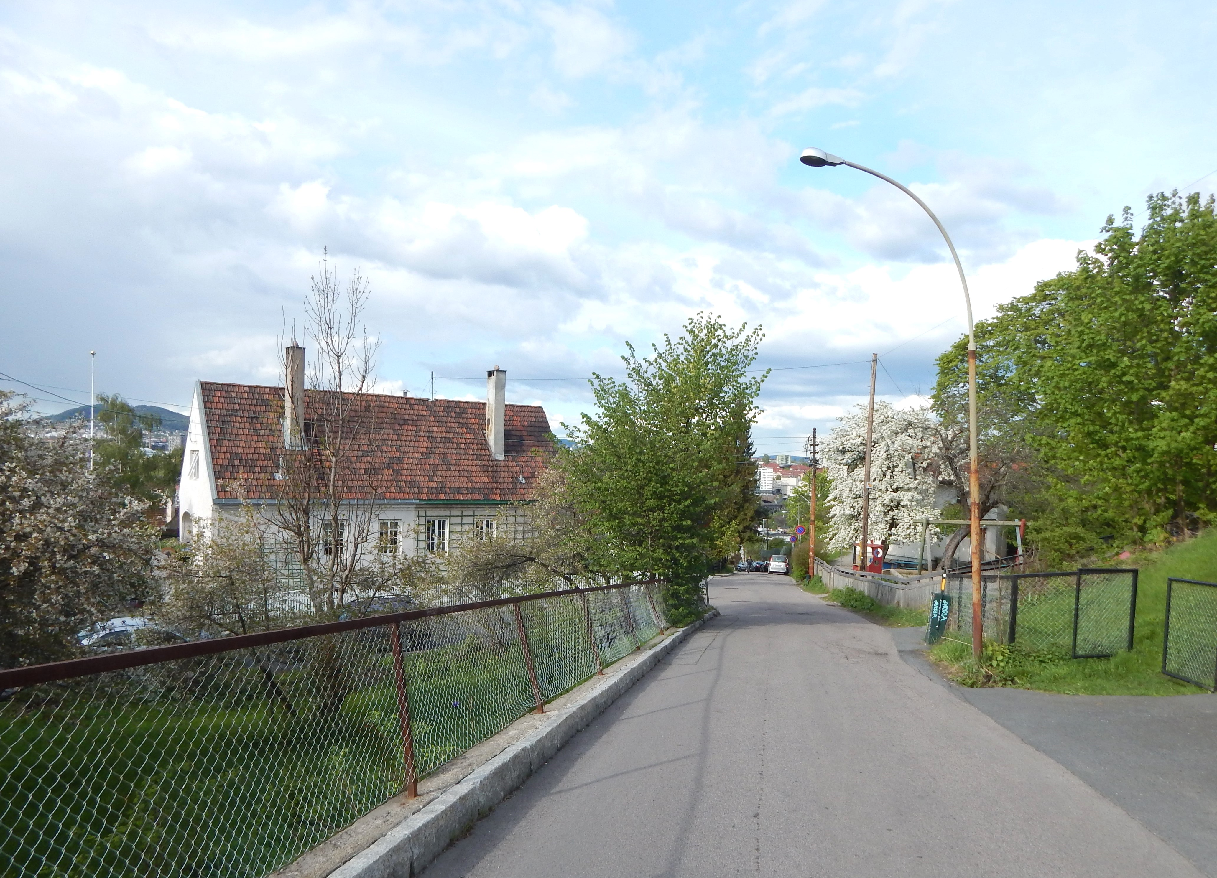 Utsikten